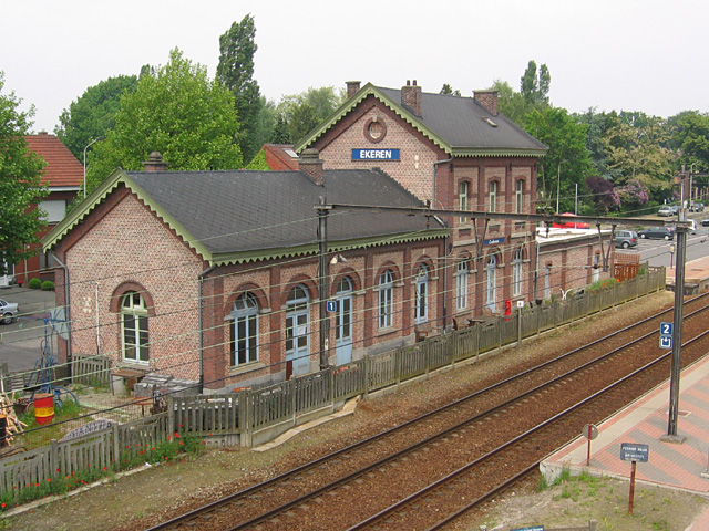 Station van Ekeren langs spoorlijn 12 (Antwerpen-Essen-Roosendaal)